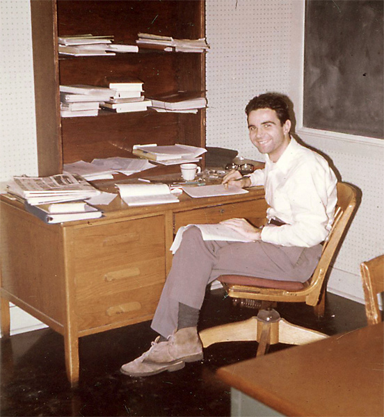 Francesco Fedi da studente laureato negli USA